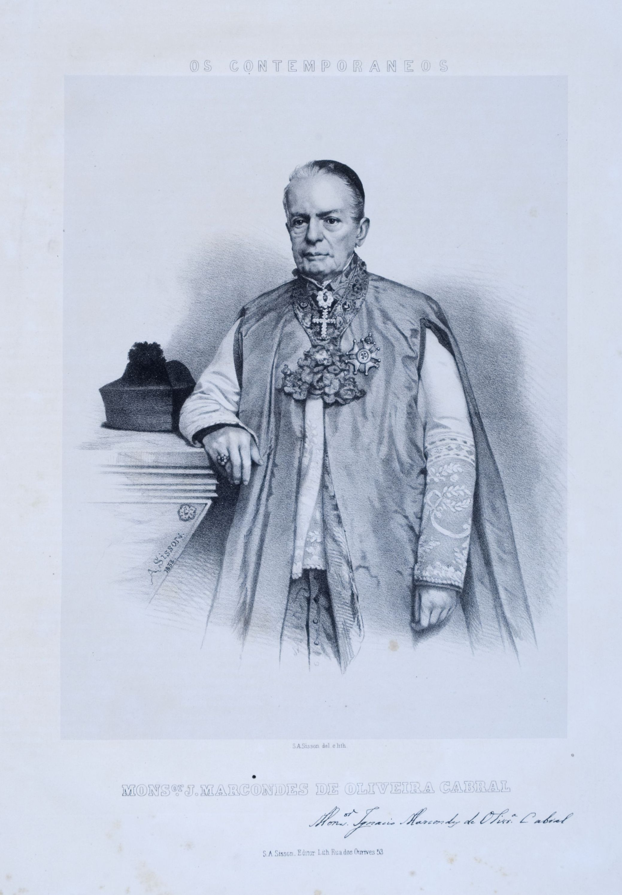 Litografia em preto e branco